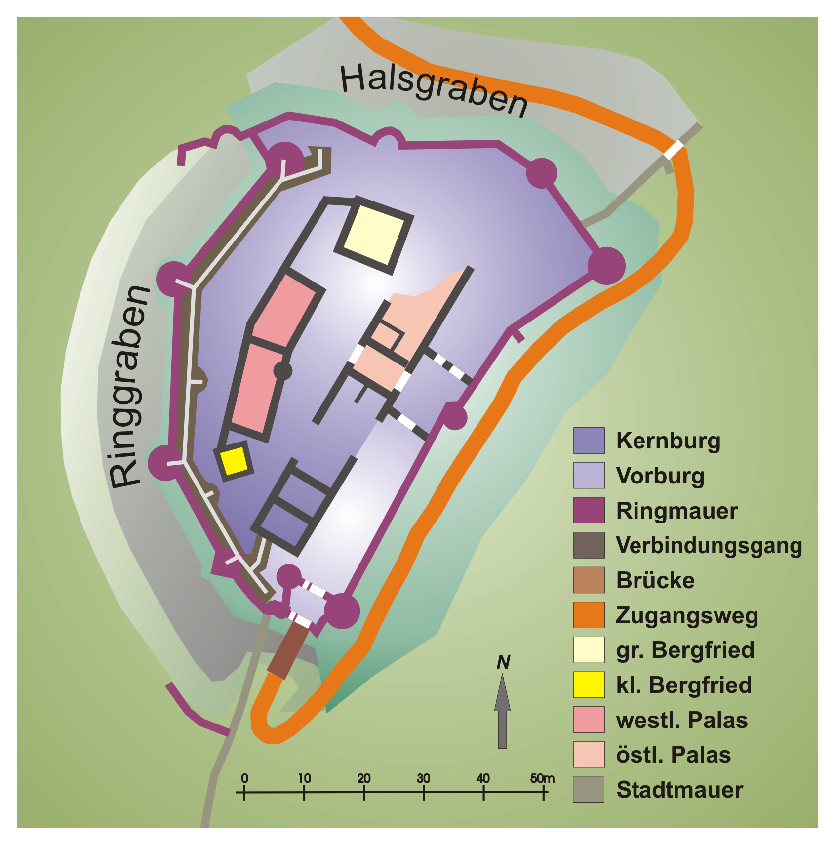 Lageplan der Ruine Henneburg in Stadtprozelten am Main